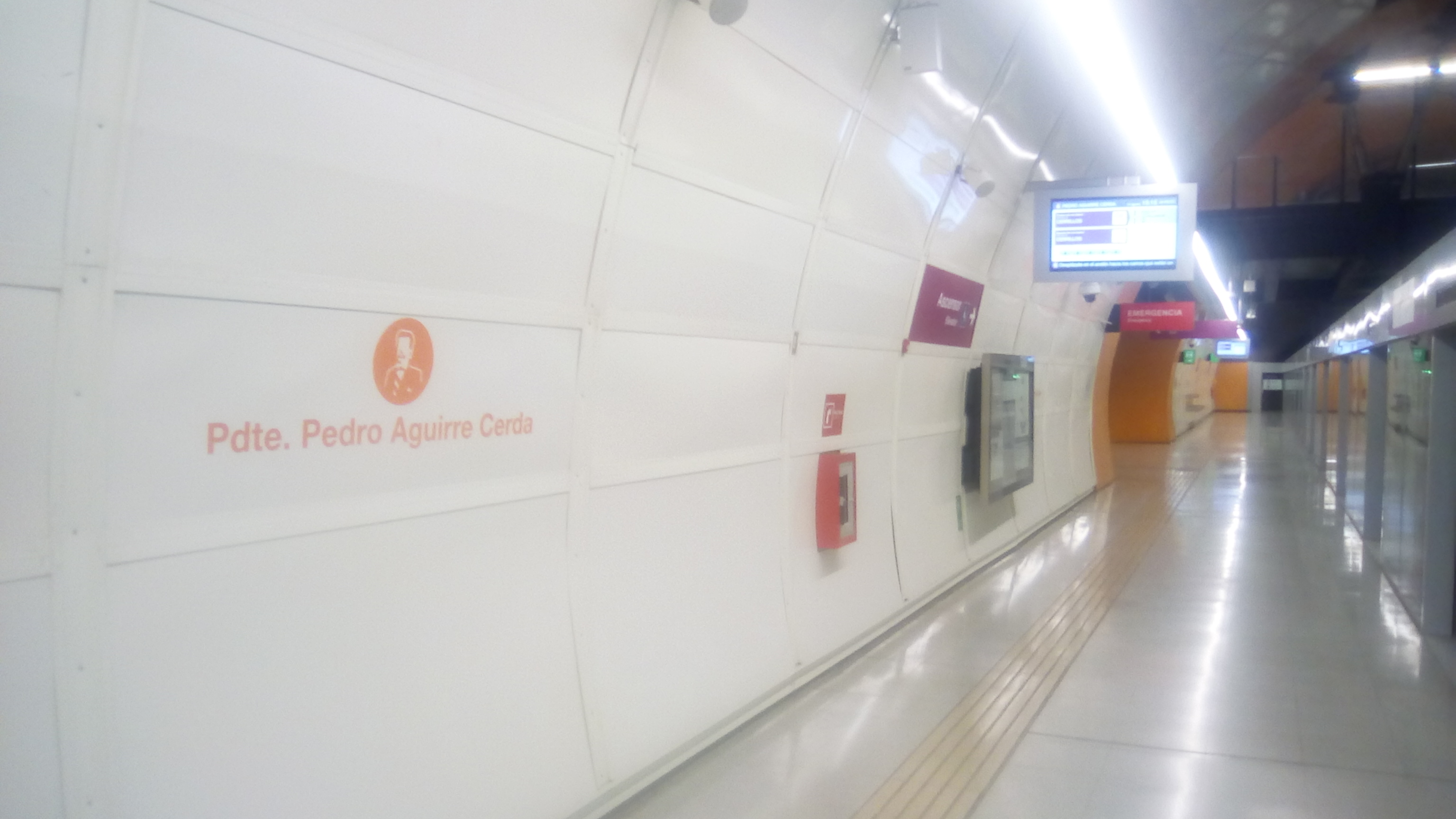 Estación Presidente Pedro Aguirre Cerda